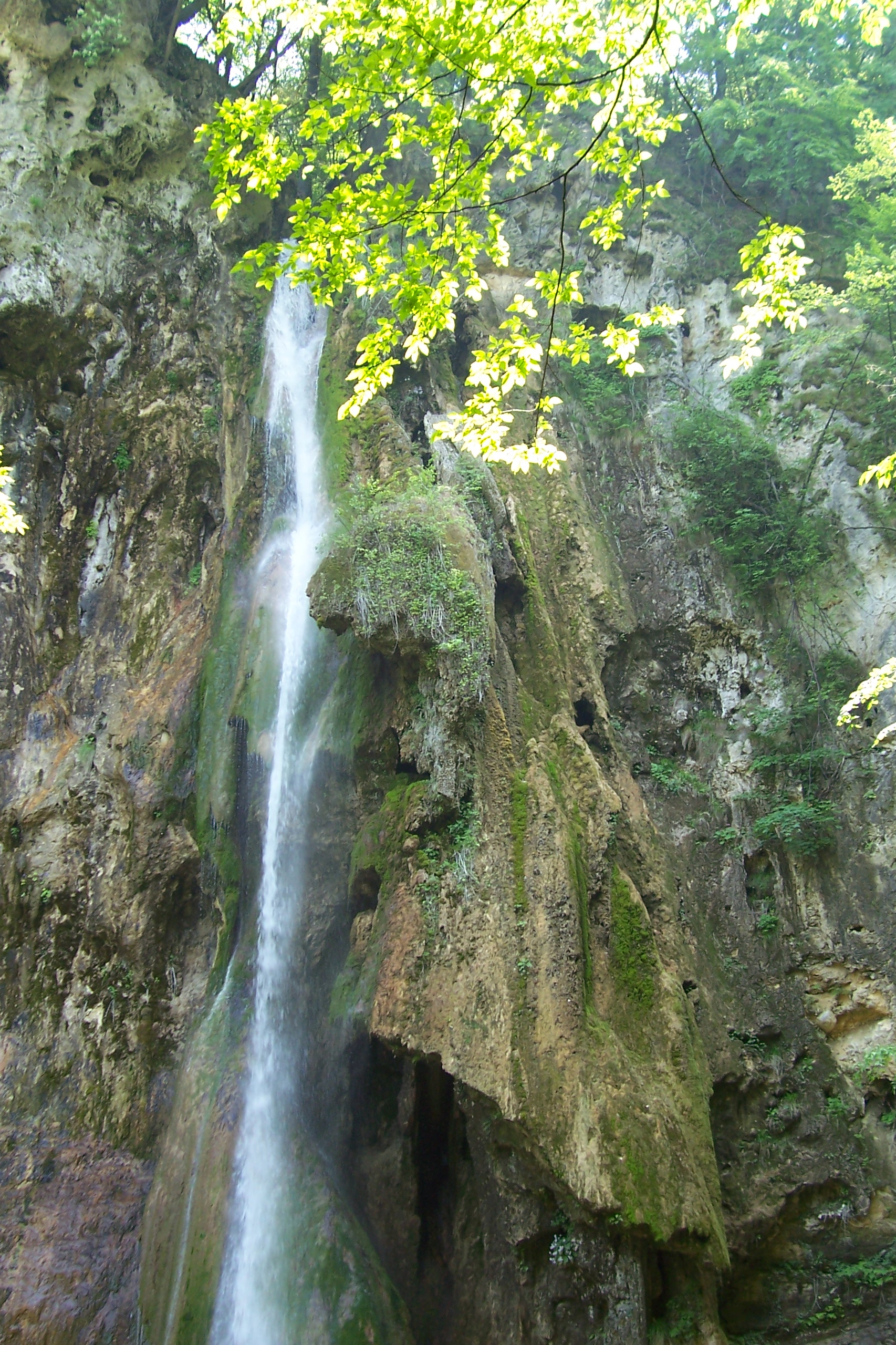 Slivodolsko padalo